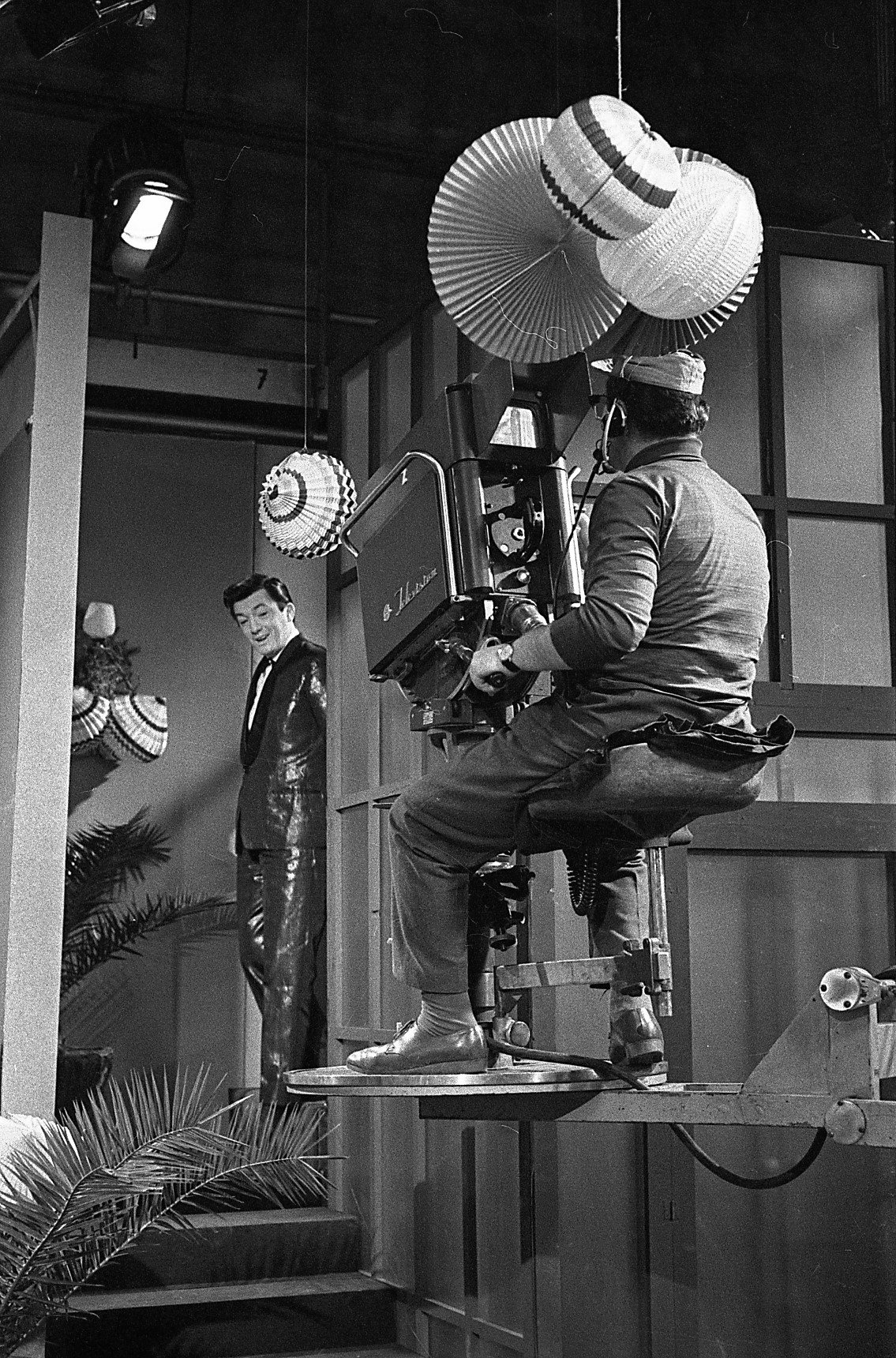 Djordje Marjanović, Dugme za peti sprat, 1963.Foto:Stevan Kragujević (po odobrenju kćerke Tanje Kragujević)